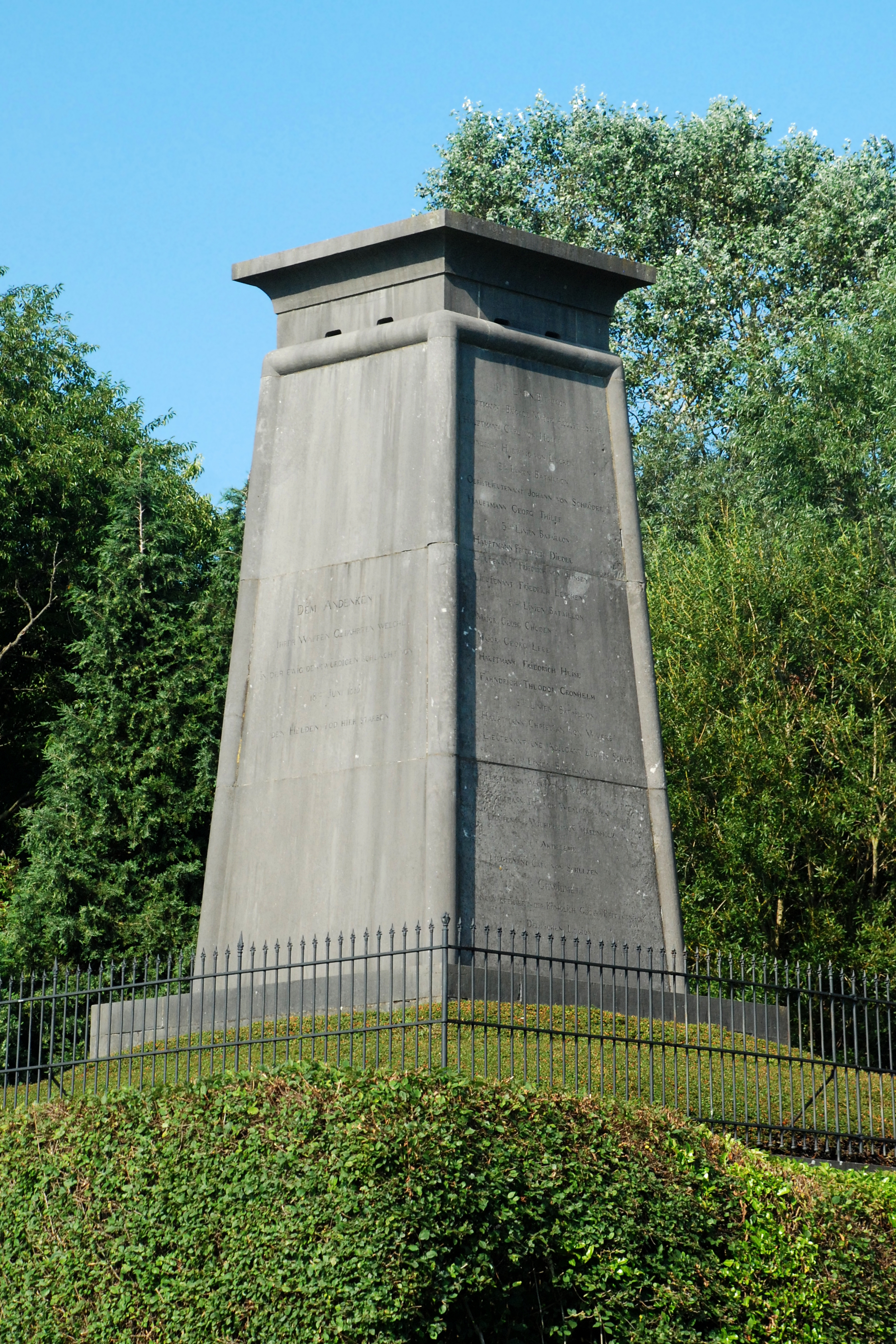 Belgique - Brabant wallon - Lasne - Monument aux Hanovriens